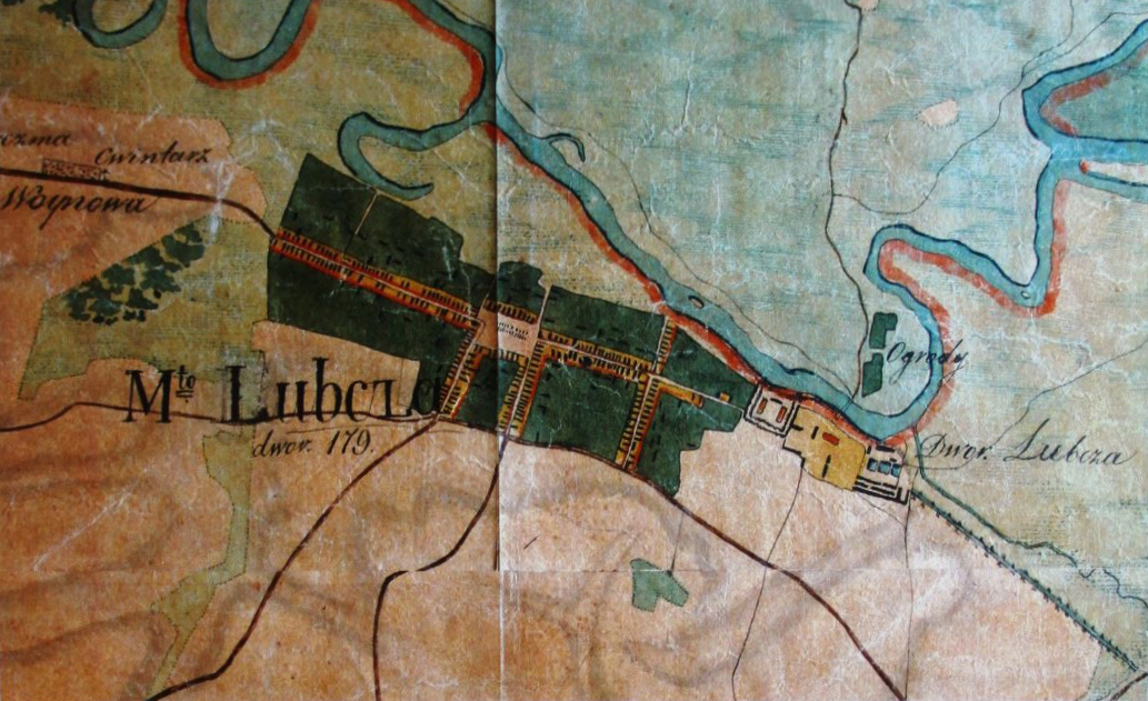 Беларуская (тарашкевіца): Любча (Lubča). Плян мястэчка